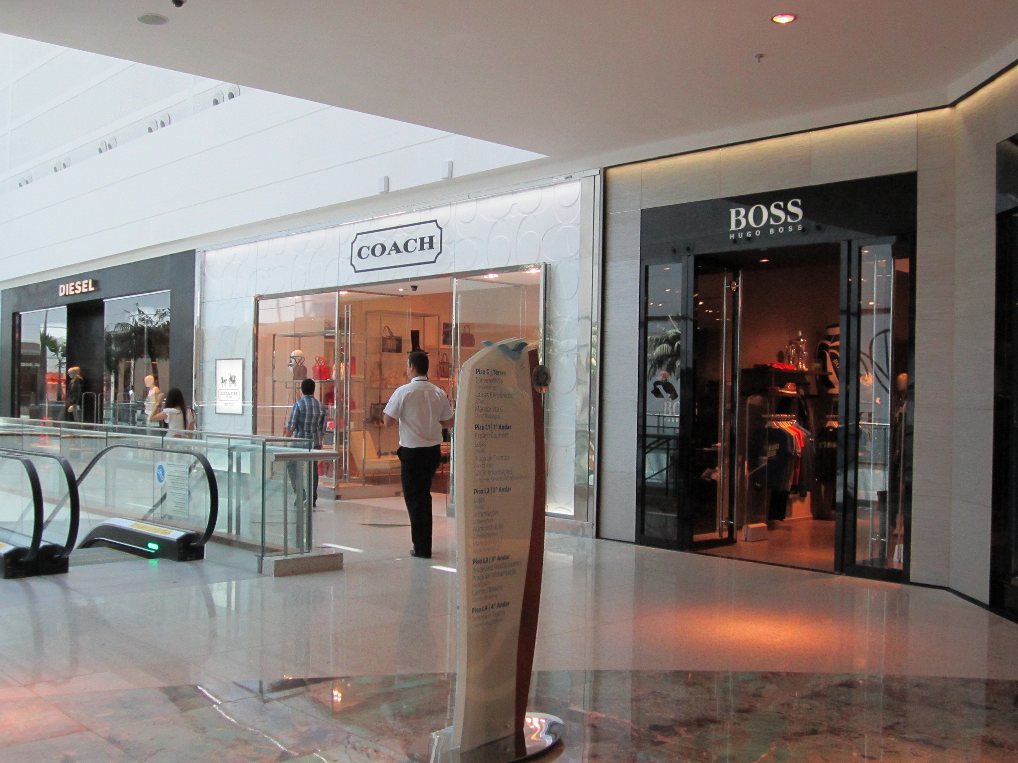 Hugo Boss, Coach e Diesel no RioMar Shopping - Recife, Pernambuco, Brasil